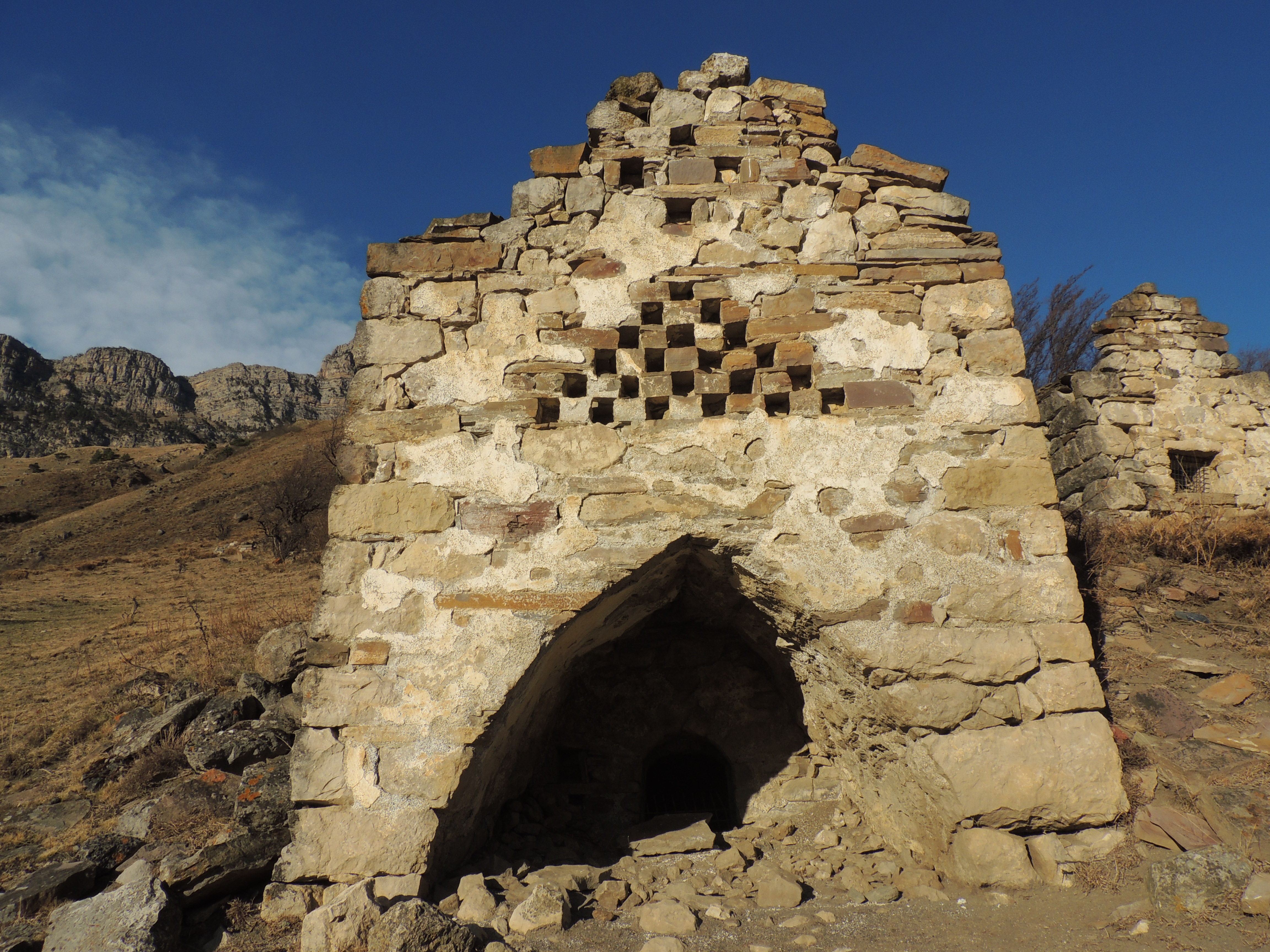 Склеповый могильник в древнем городе Таргиме (Ингушетия)